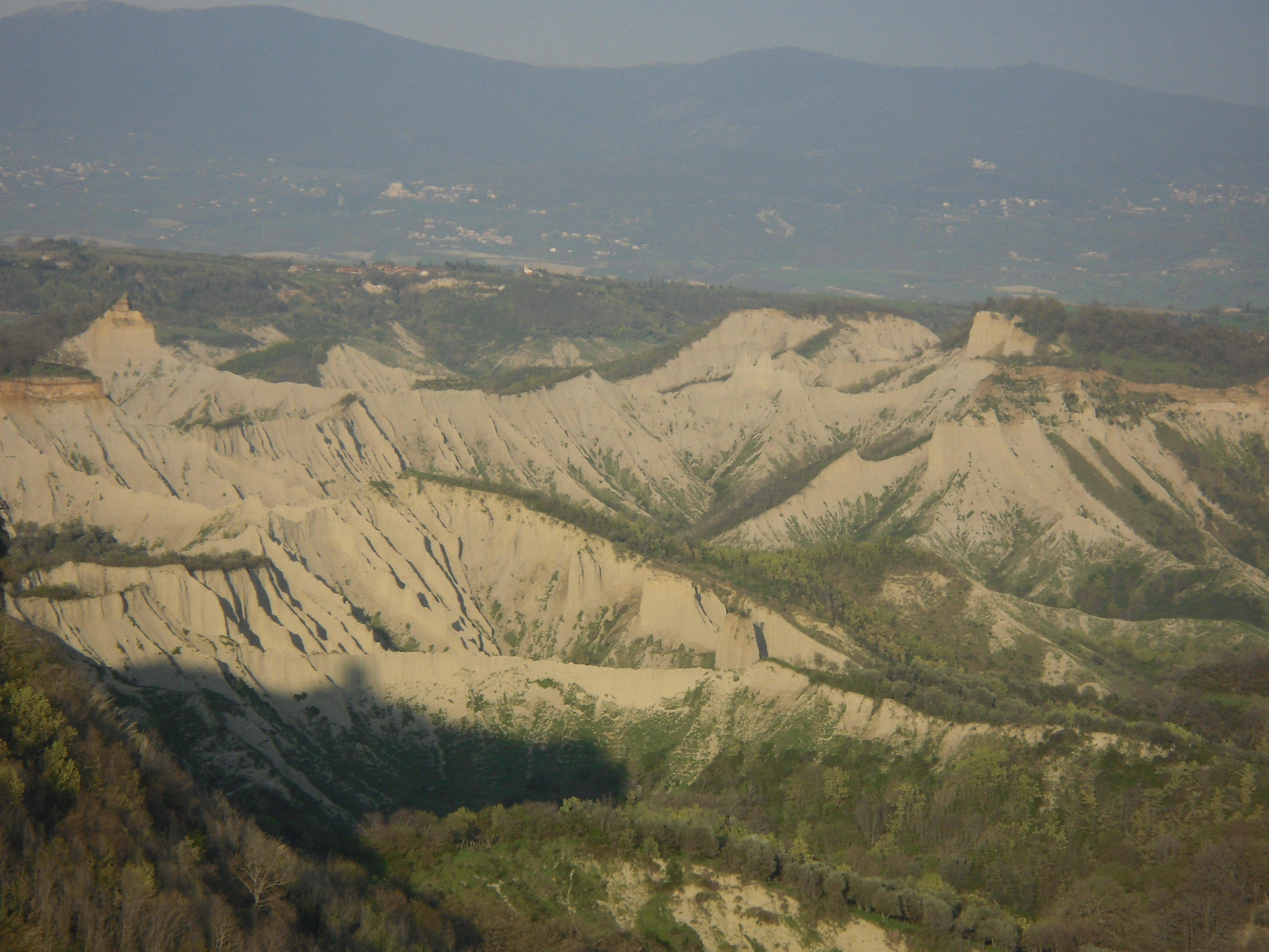 foto dei Calanchi